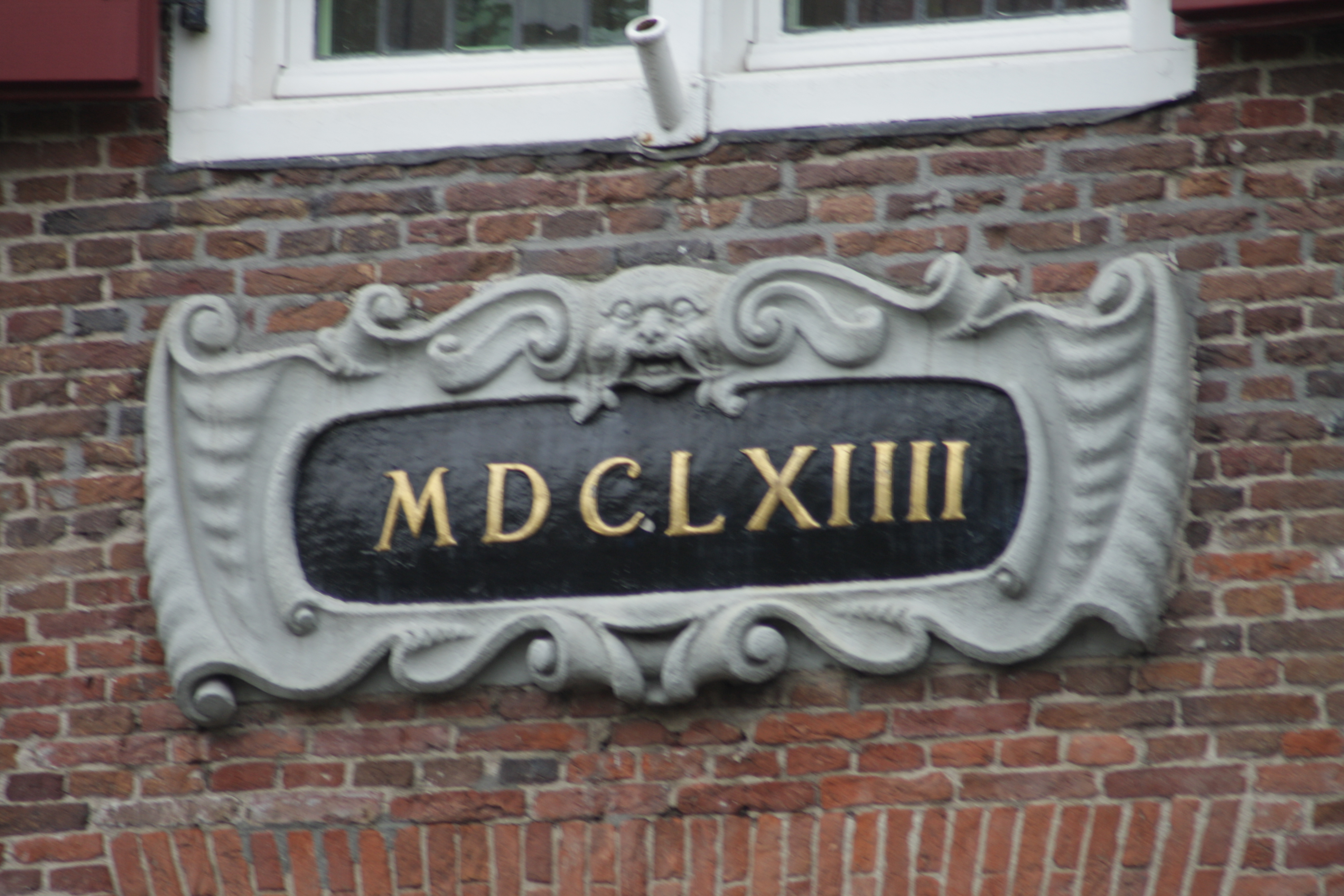 Amersfoort, Havik 25; gevelornament met jaartal.